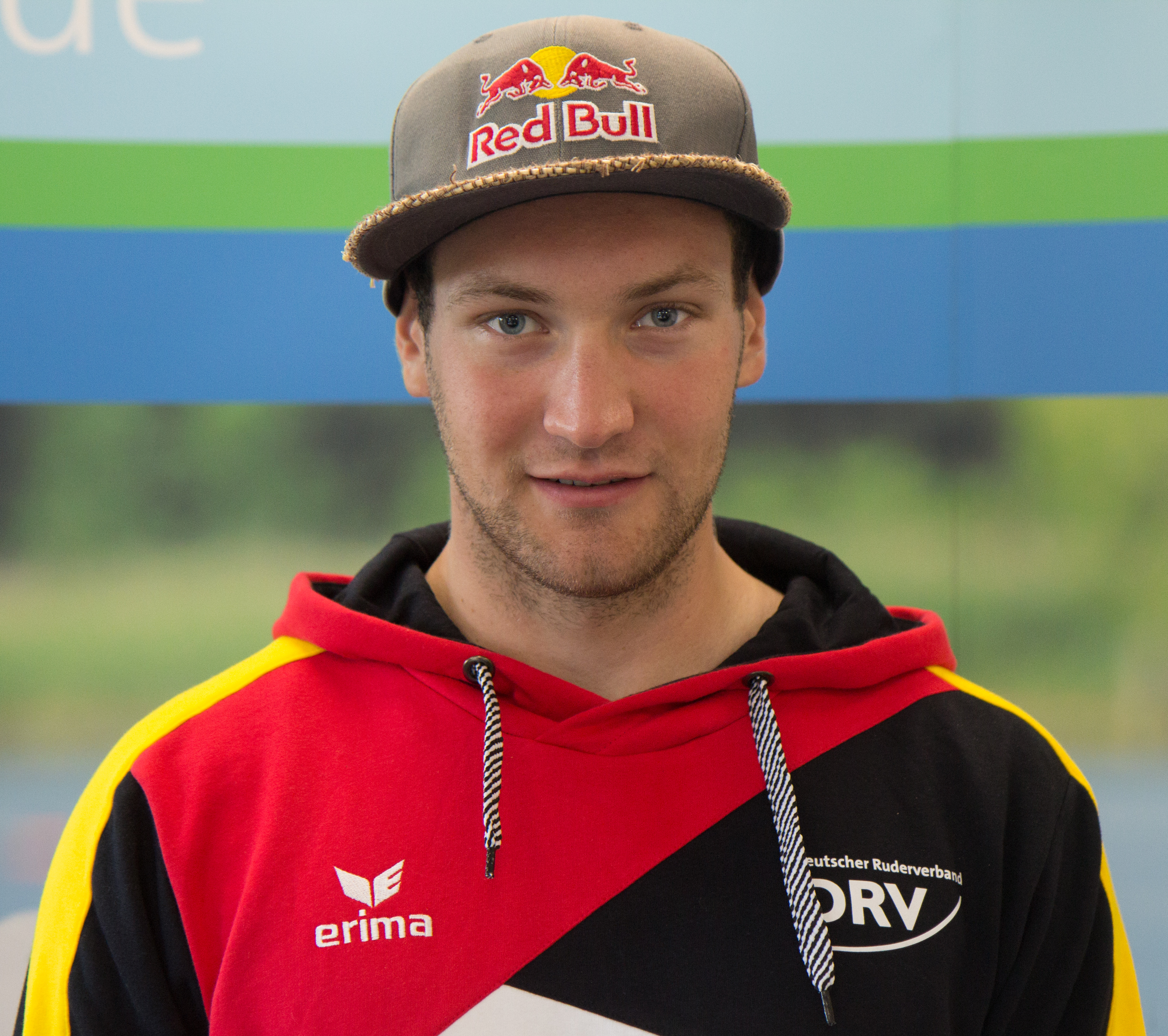 Tim Ole Naske beim Medientag des Deutschen Ruderverbandes am 6. September 2017 in der Ruderakademie in Ratzeburg.